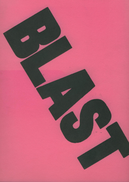 Titel der Zeitschrift BLAST (Ausschnitt)